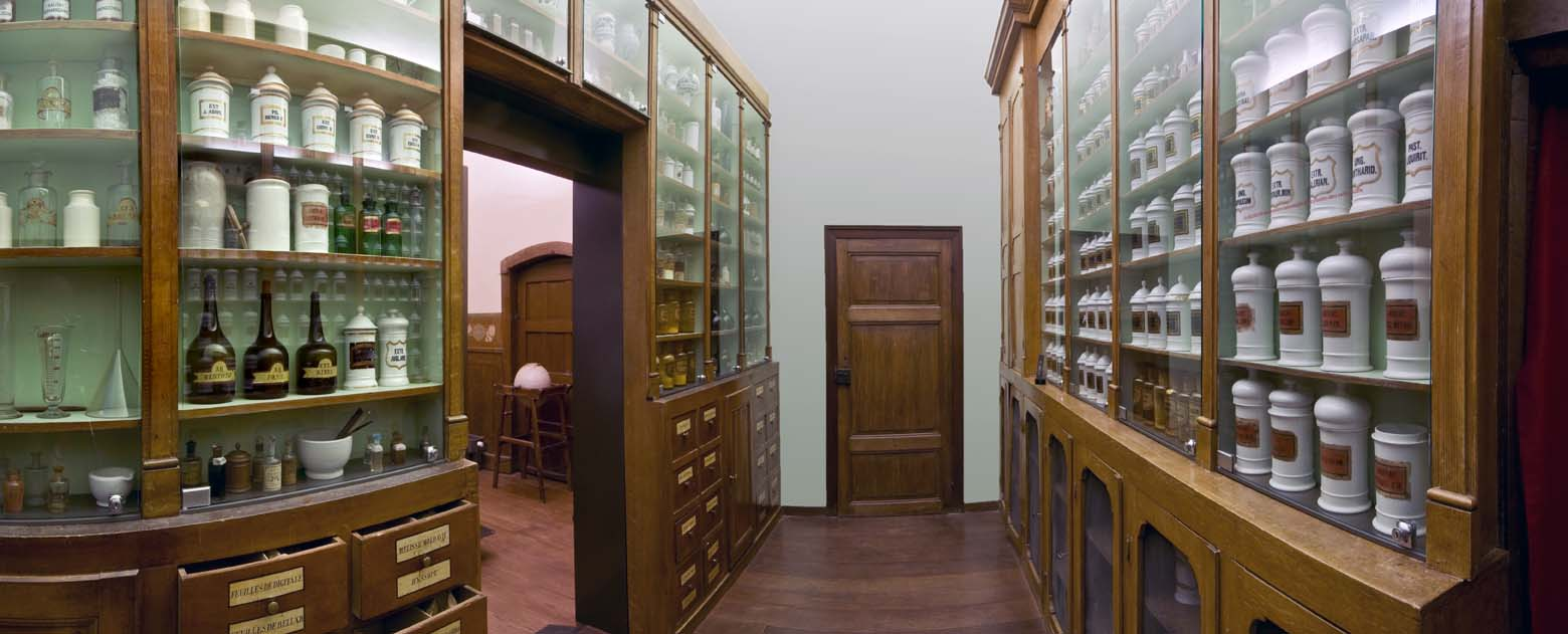 pharmacie